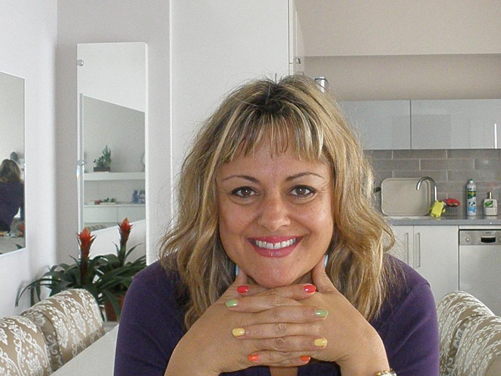 תמונה של הסופרת זוהר אביב